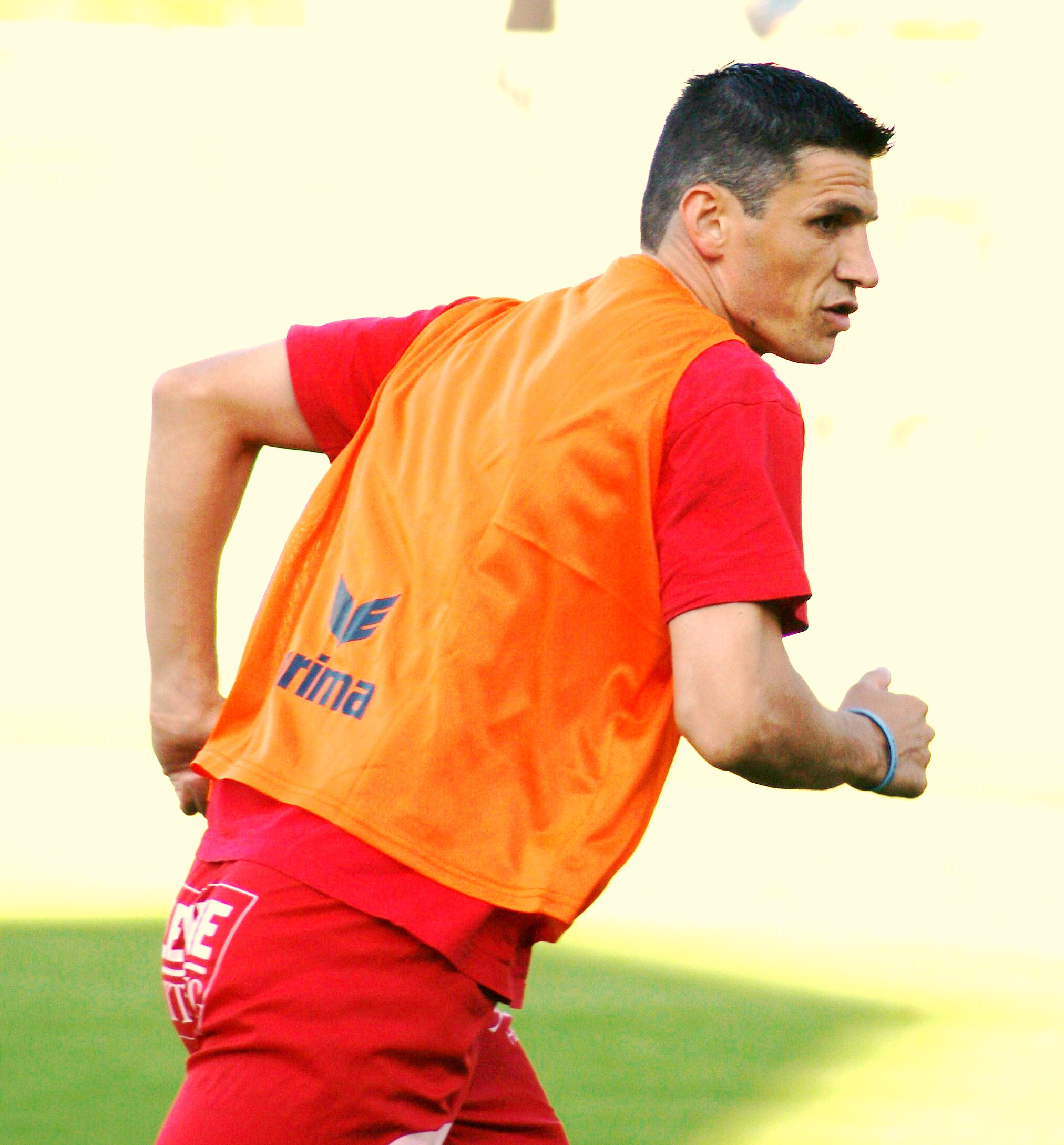 Portrait von Mario Majstorović, Spieler der Kapfenberger SV